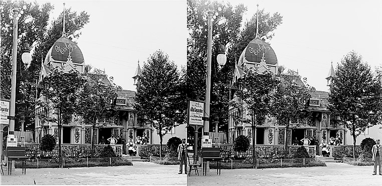 Titel Kaiser Jubiläumsausstellung in Wien 1898 Beschreibung Pavillon Törley. Staffage. Autor Möhsl, Karl Technik Schwarz-Weiß-Negativ Datierung 1898